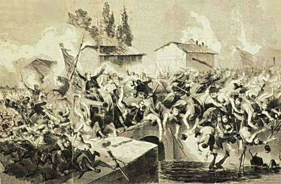 "Battaglia di Palestro del 1859", ridotto e corretto, litografia